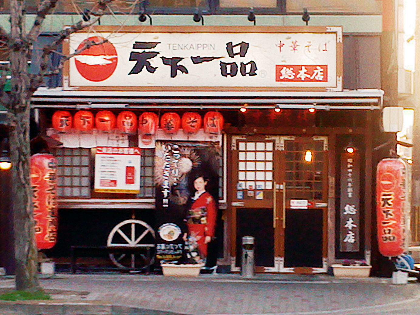 天下一品 総本店, 京都市左京区一乗寺築田町94